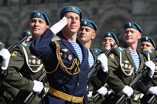 Москва. Красная площадь. Военный парад в честь 64-й годовщины Победы в Великой Отечественной войне.